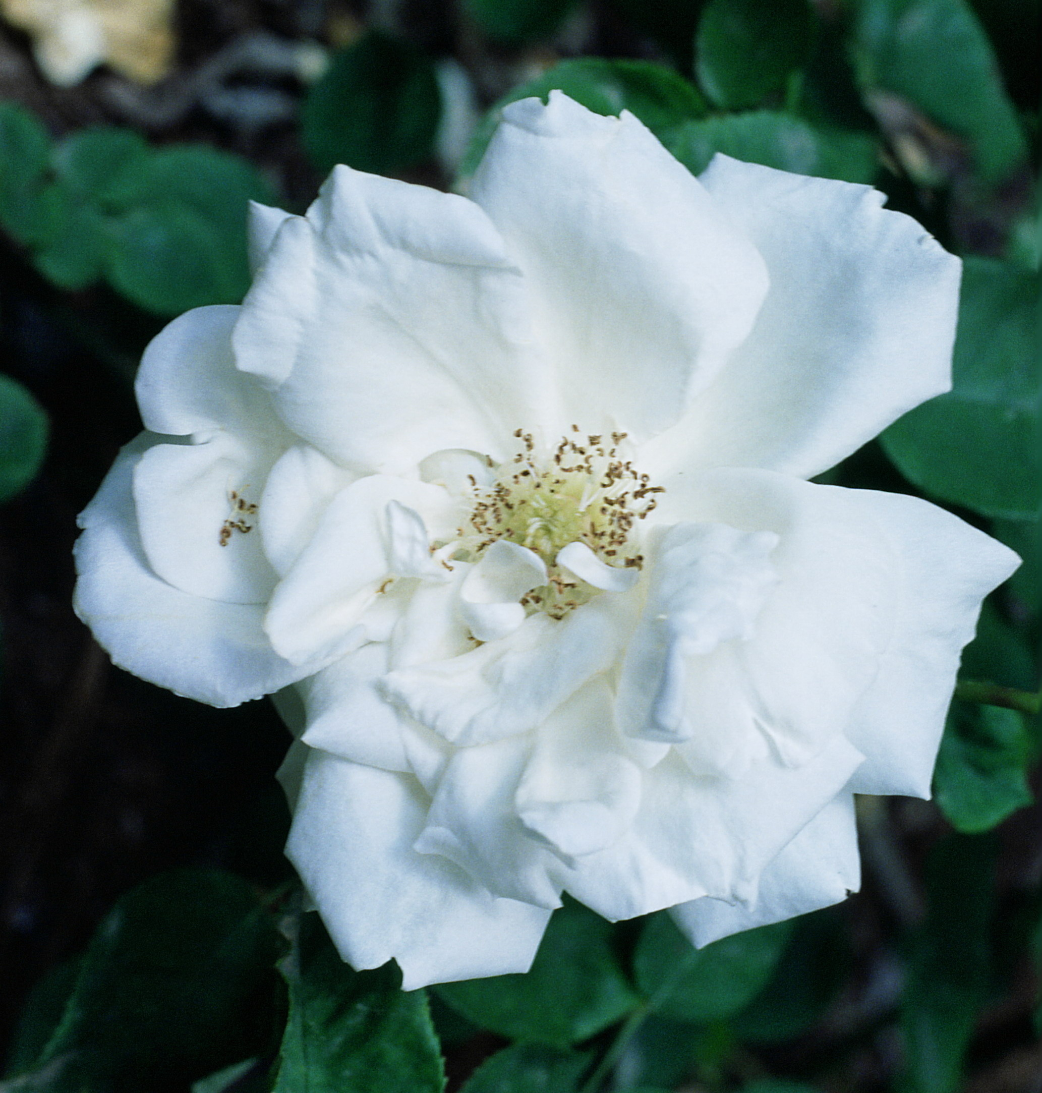 Rosa 'Frau Karl Druschki', Híbridos reflorecientes, sect. Rosa. Real Jardín Botánico, Madrid